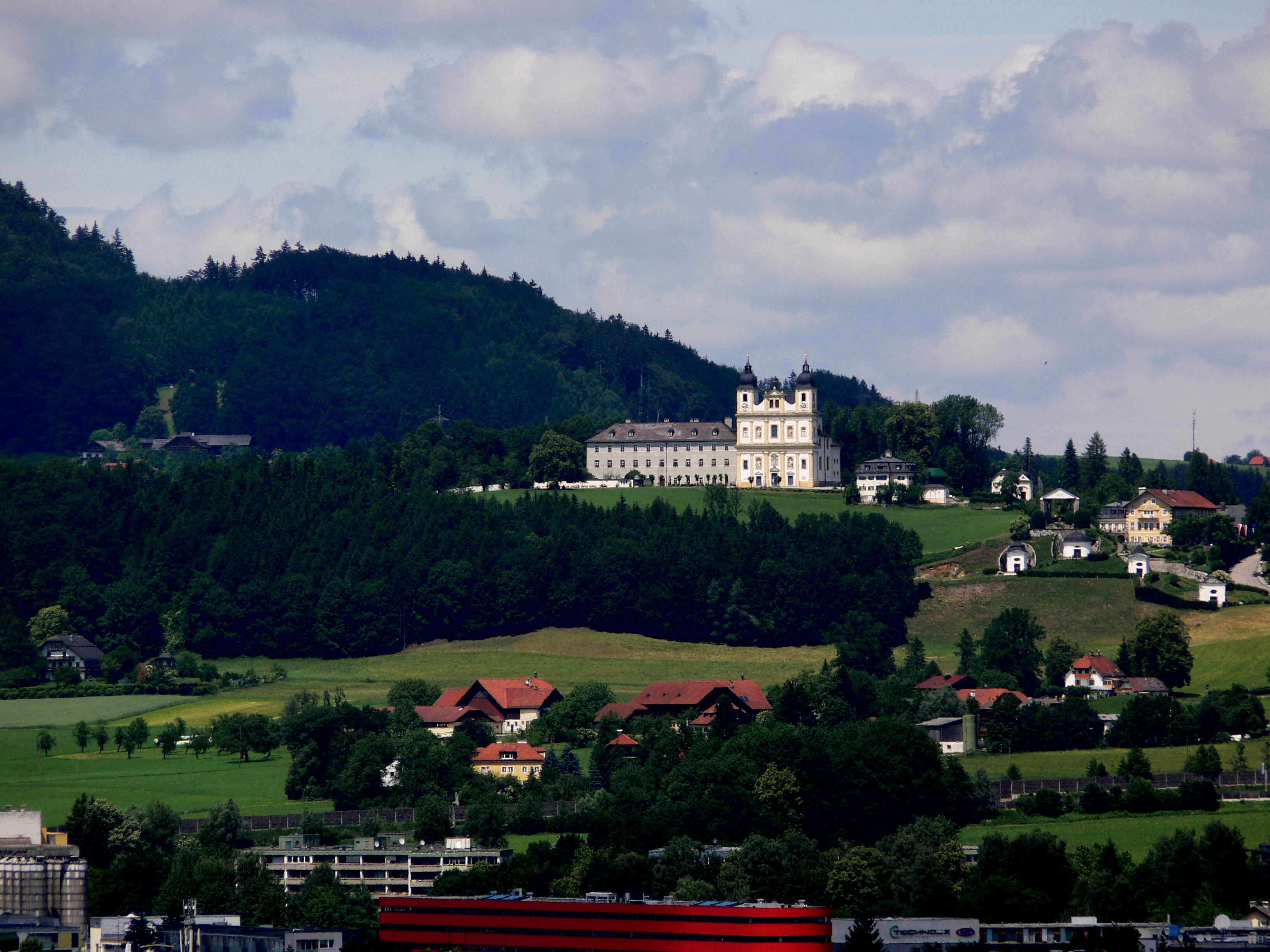 Salzburg, Aussicht vom Mönchsberg Maria Plain